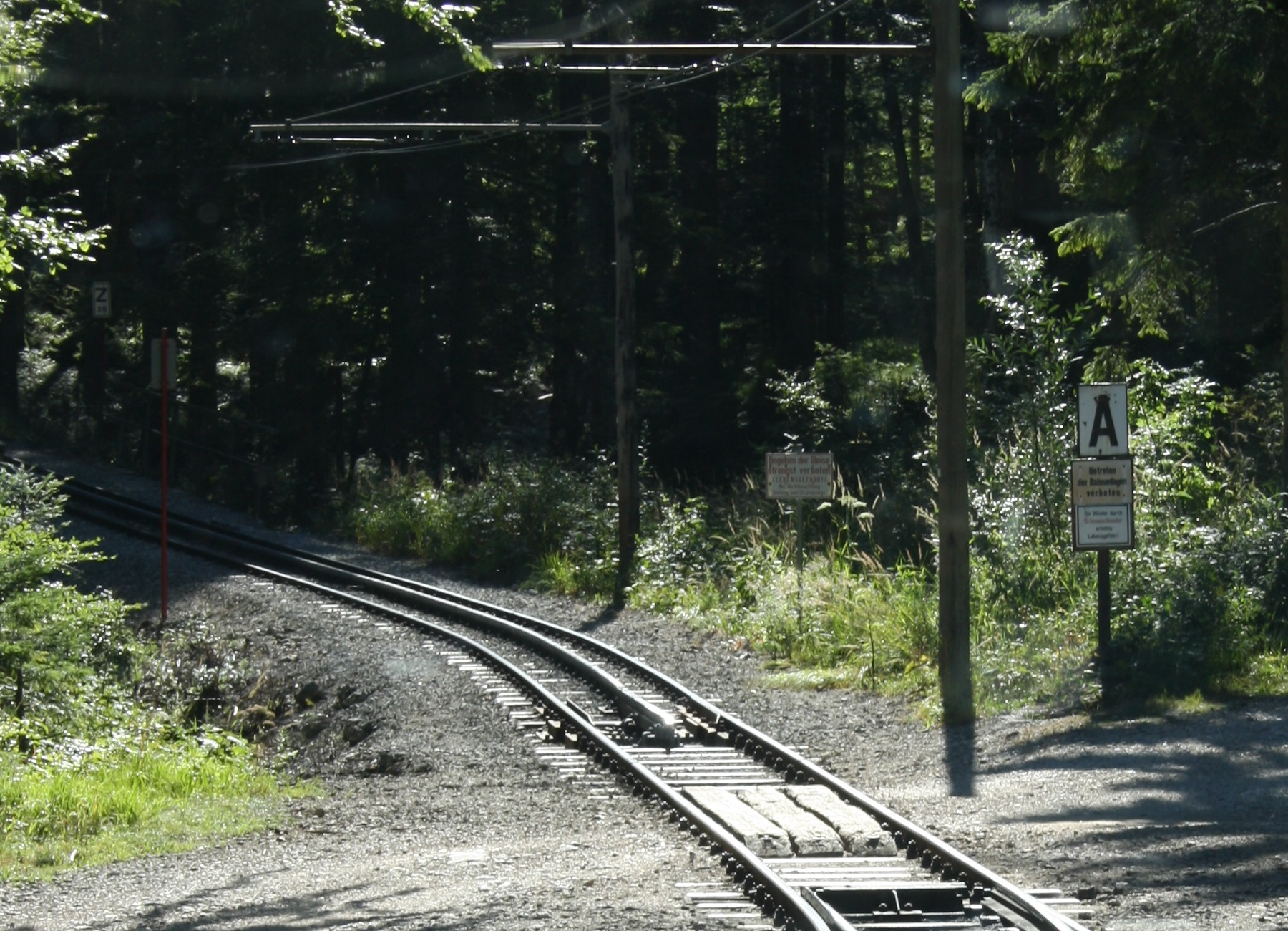 Zahnstangeneinfahrt der Wendelsteinbahn nach dem Bahnhof Aipl